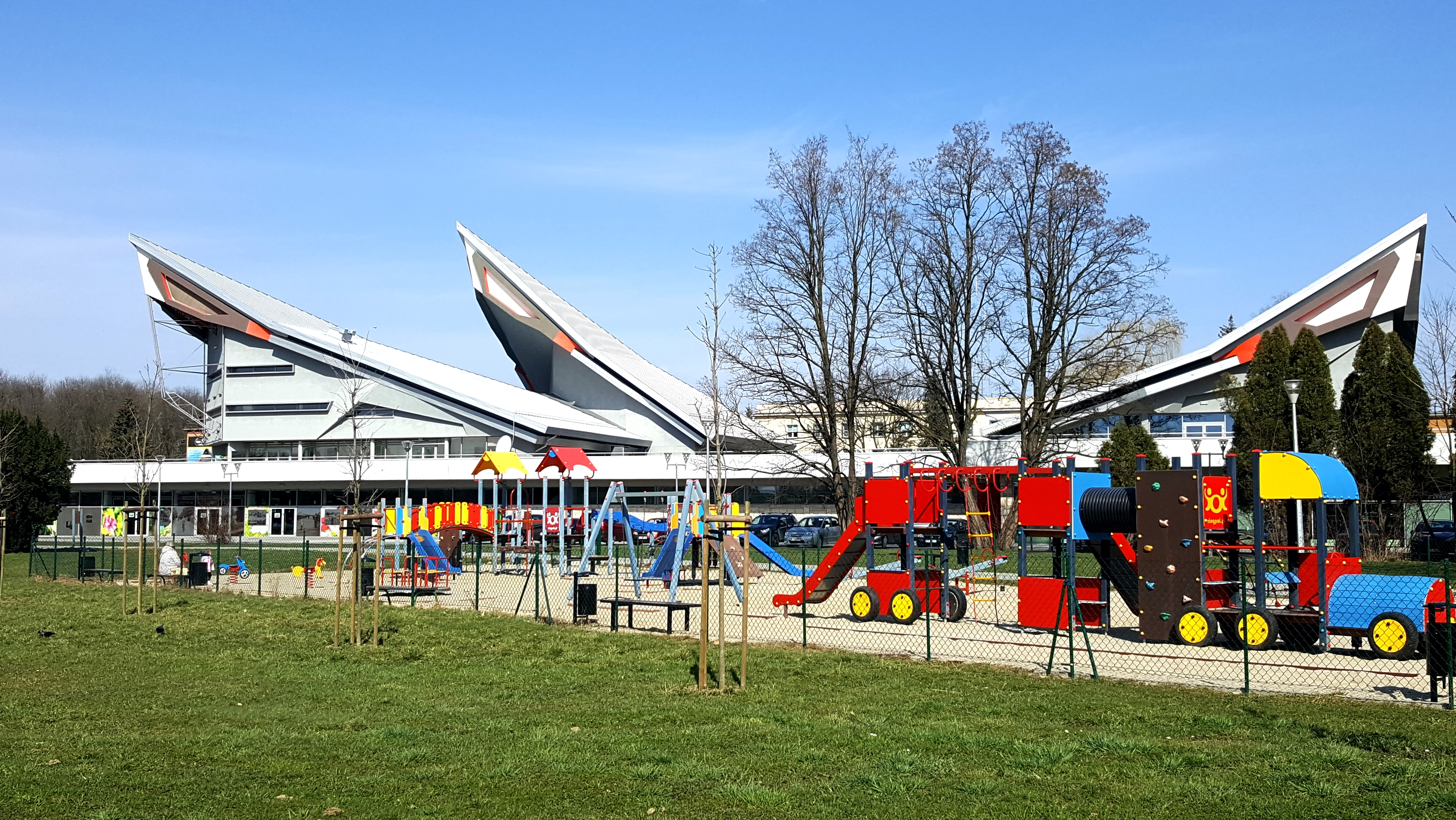 Centrum Sztuki Mościce w Tarnowie